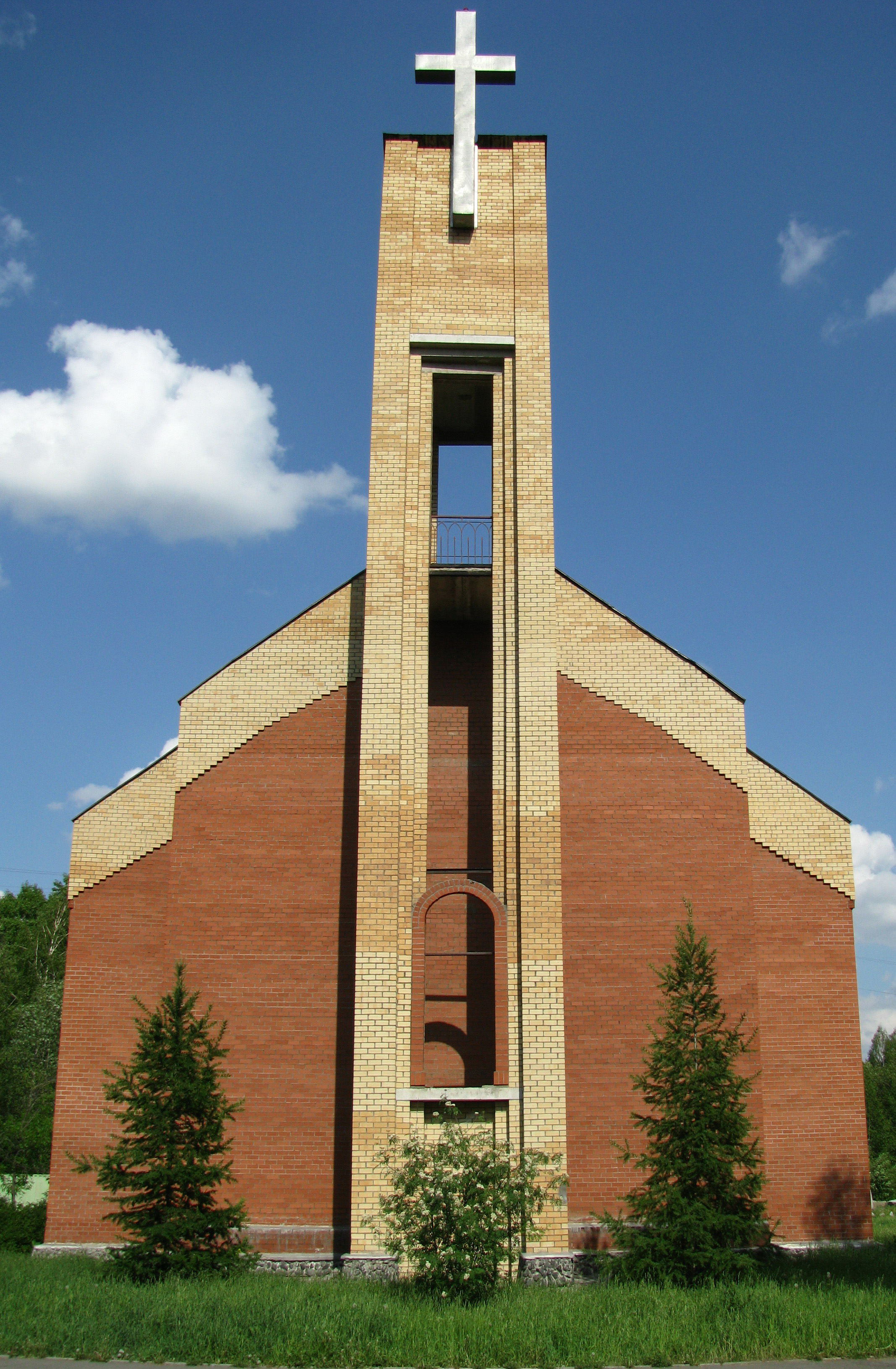 Первая объединённая методистская церковь, г.Екатеринбург